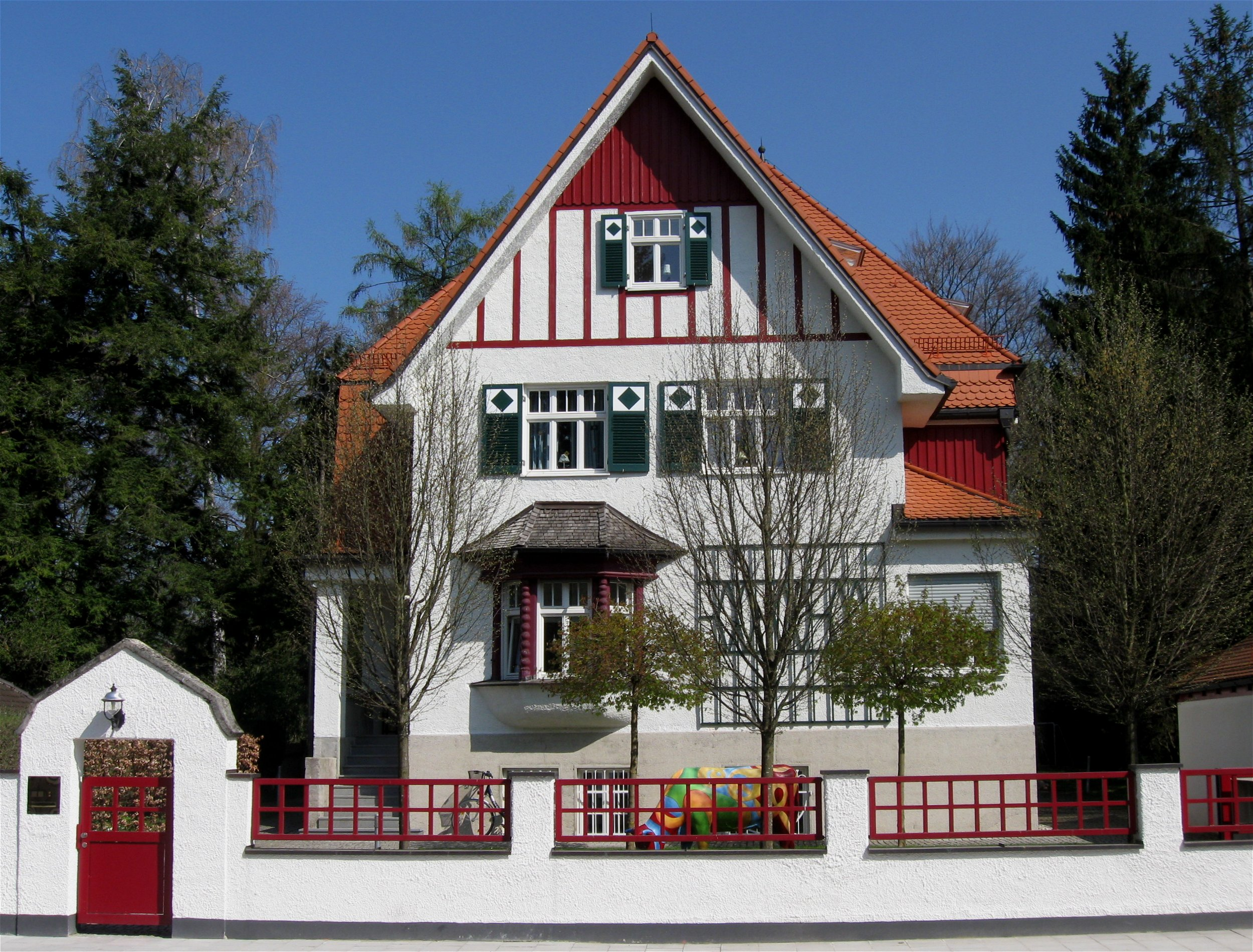 München, Benediktenwandstraße 17; Villa, historisierend, Anfang 20. Jh.